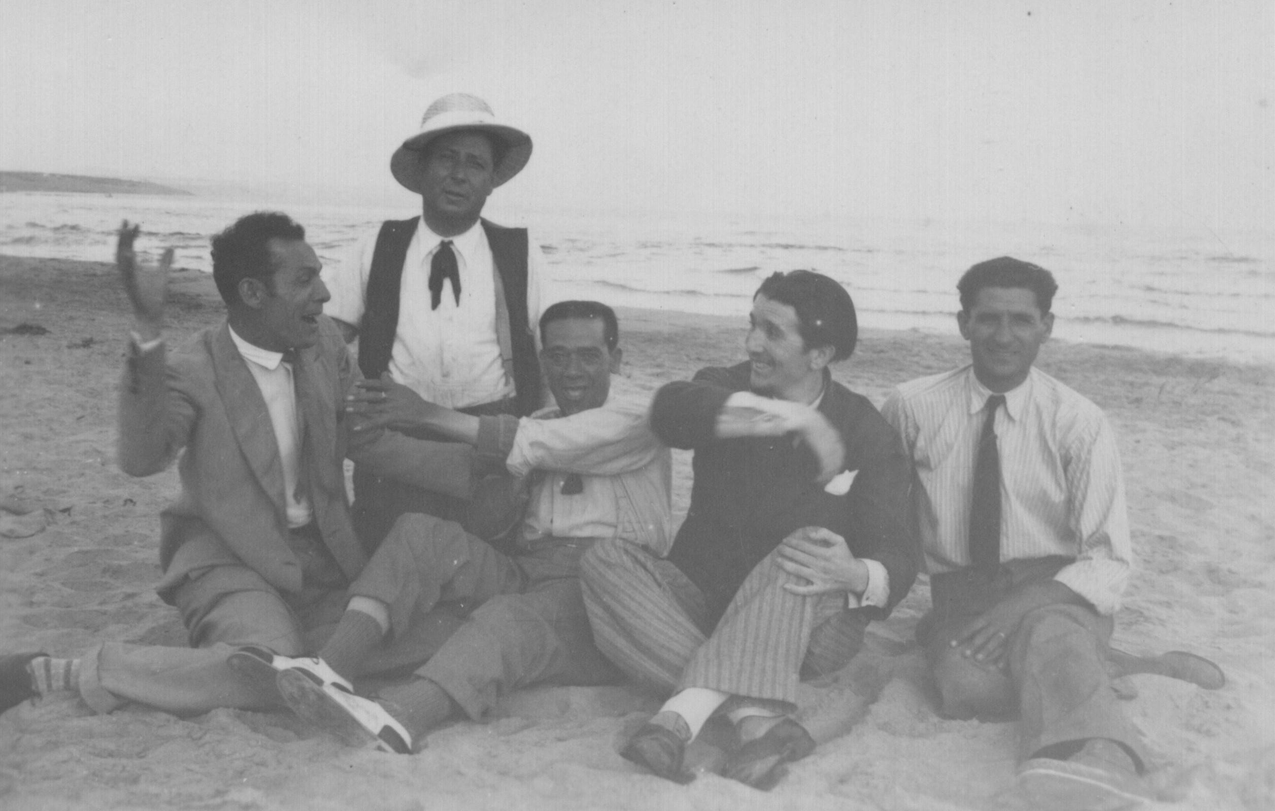 Il sindacalista di Sciacca Accursio Miraglia (2 gennaio 1896 - ucciso dalla mafia il 4 gennaio 1947), con un gruppo di amici al Lido di Sciacca, nel 1940.